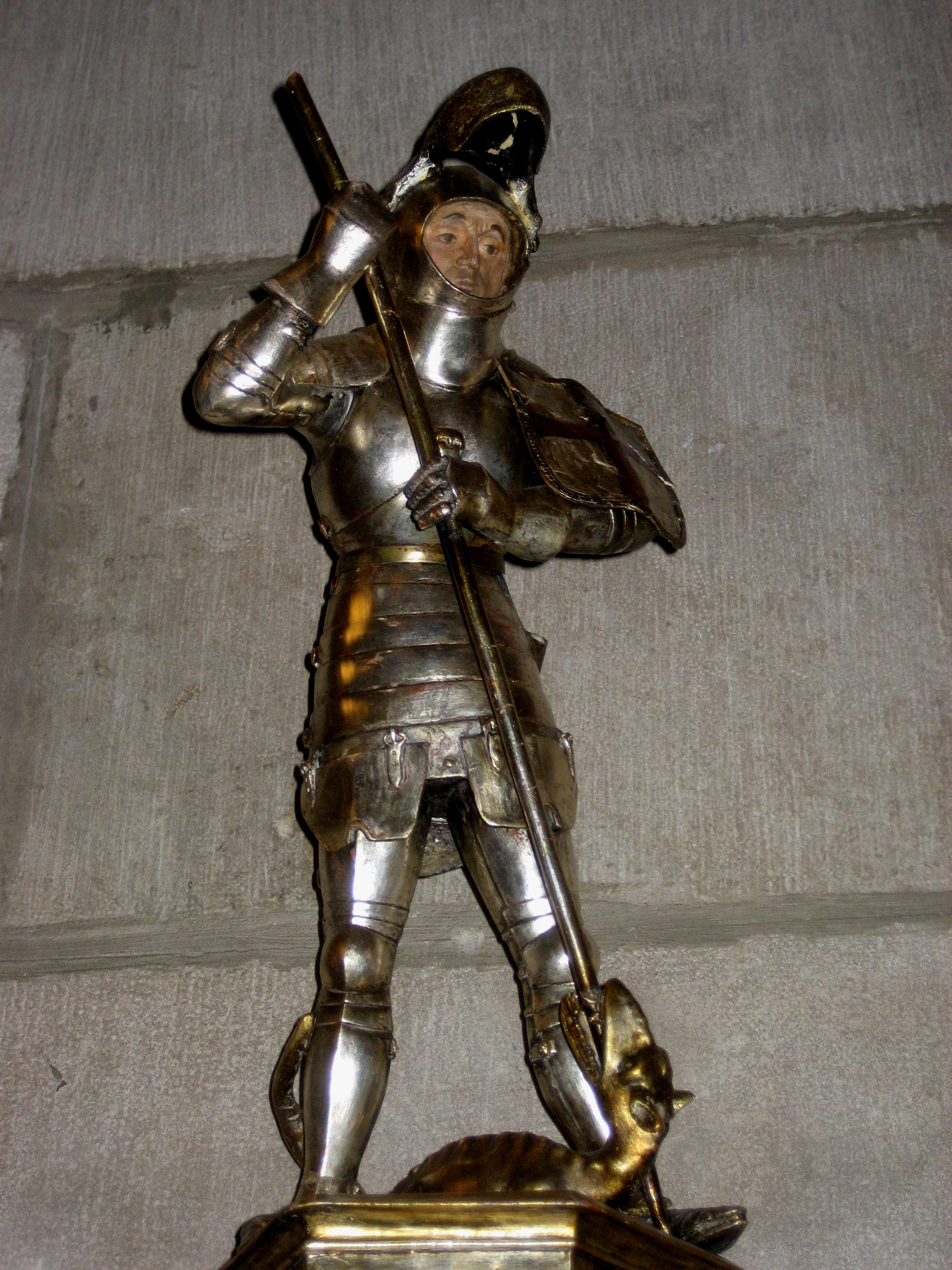 San Jorge de plata articulado de la capilla de San Jorge del Palacio de la Generalidad de Cataluña